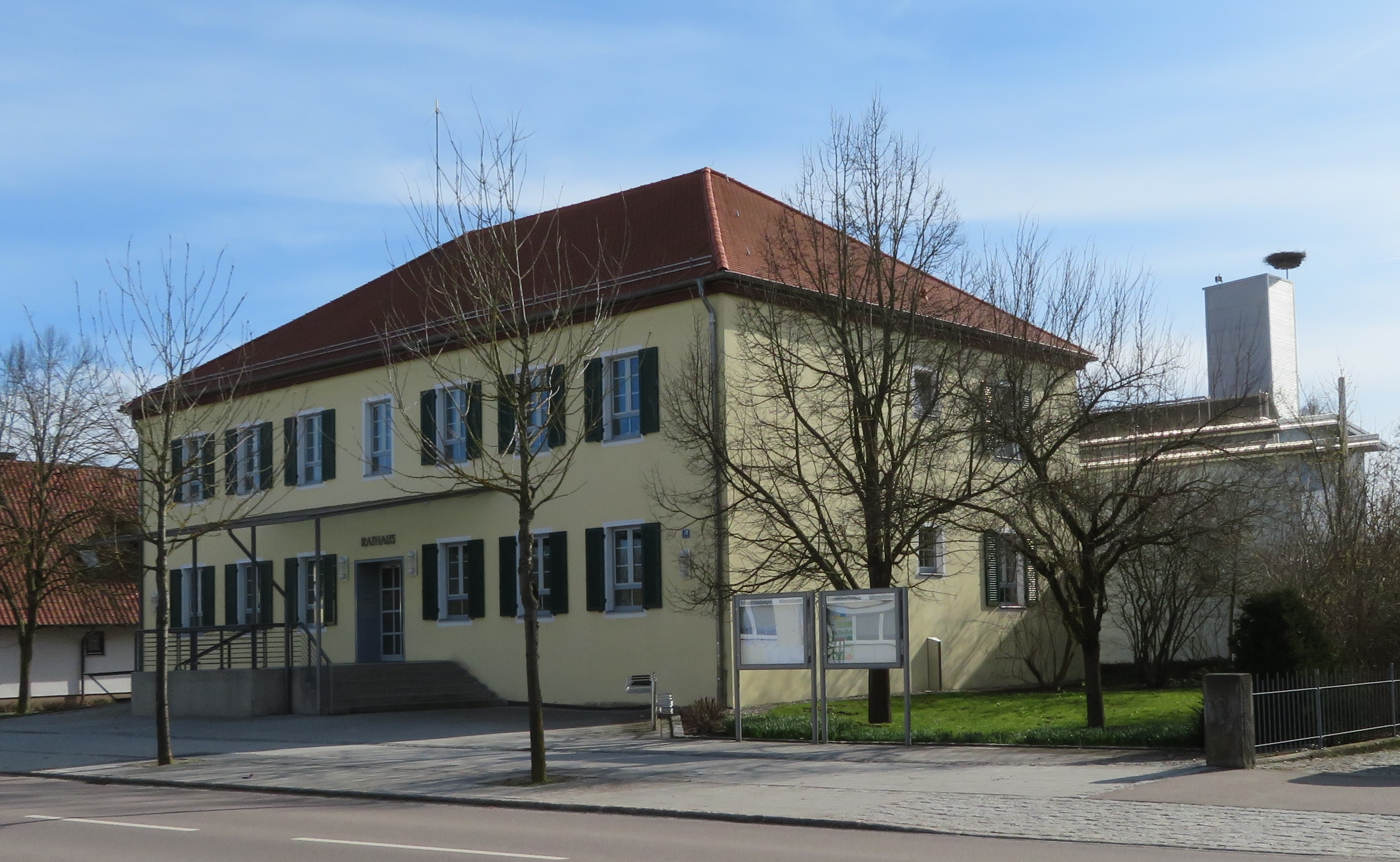 Rathaus Karlshuld, dahinter die Feuerwehr